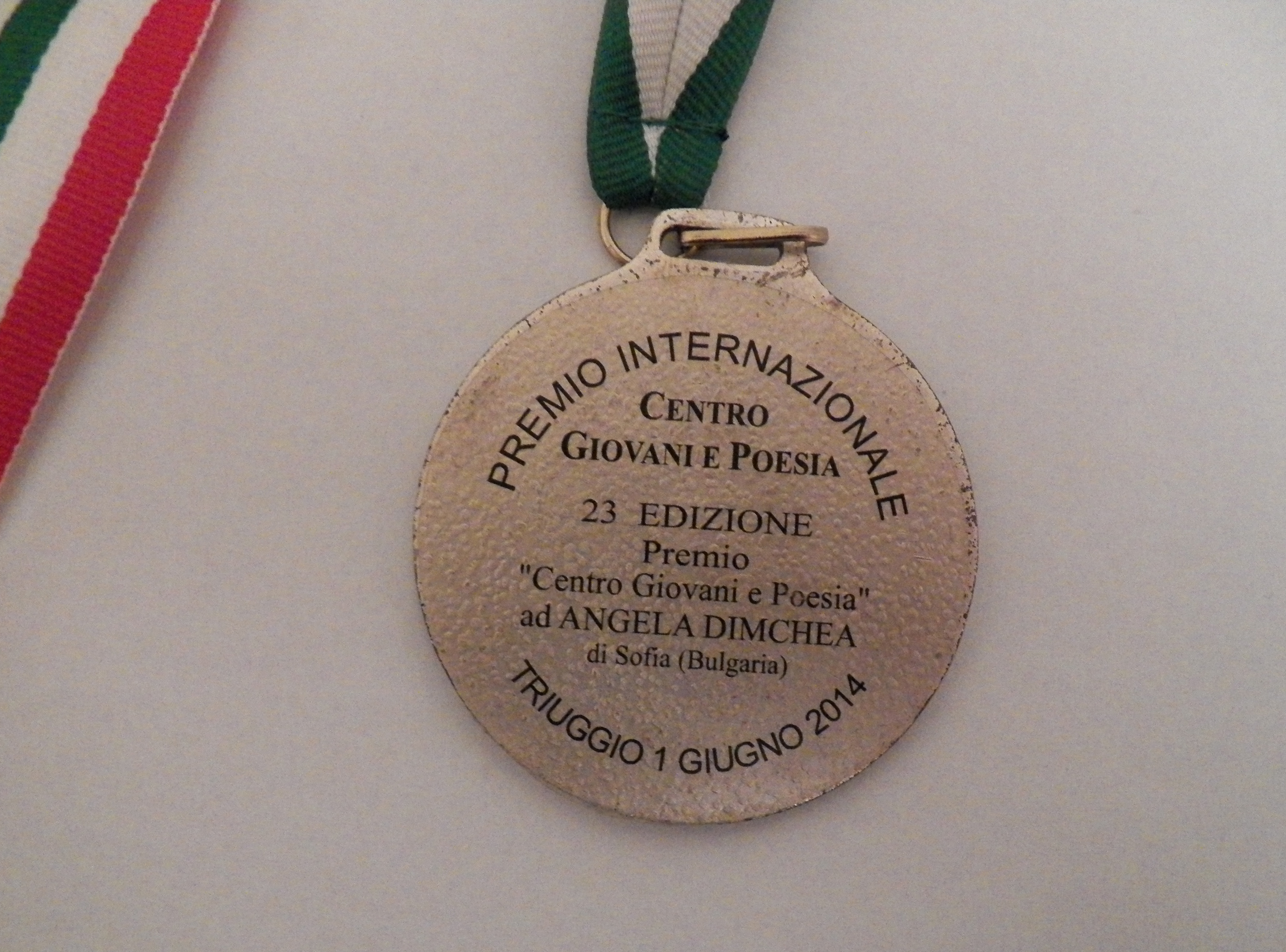 Специална награда (Медал) от ХХІІІ Международен конкурс за поезия в Триуджо, Италия, 2014